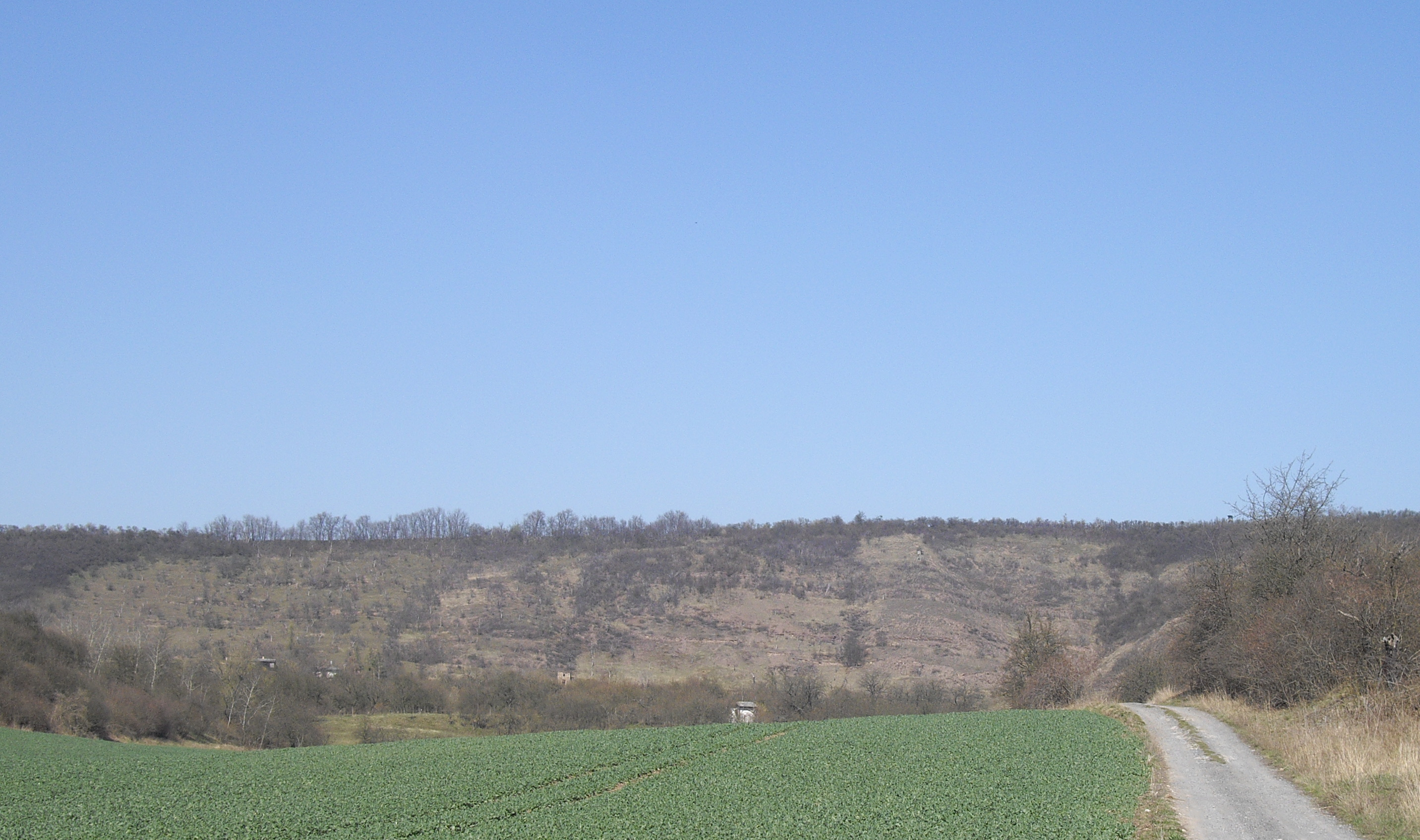 der Steilhang Riß zwischen Wormsleben und Hedersleben im Mansfelder Land